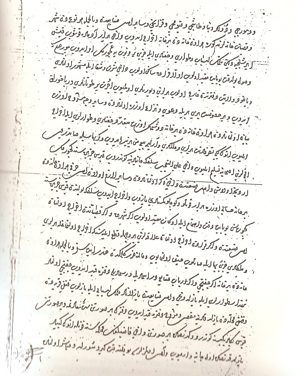 II. Selim'in Kıbrıs'a Türklerin yerleştirilmesini emreden 21 Eylül 1571 tarihli fermanının ikinci sayfası. Bu fermanın kopyaları Karaman, İçel, Bozok, Alaiye ve Teke'ye gönderilmiştir.